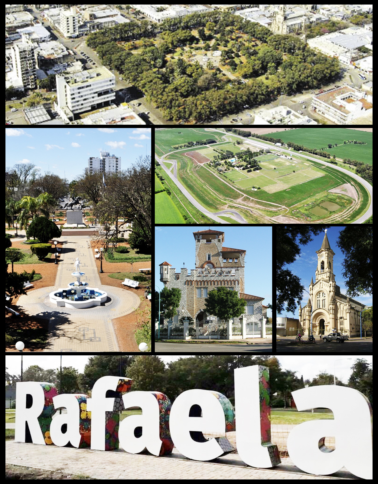 Montaje dela Ciudad de Rafaela - Santa Fe - Argentina 2020